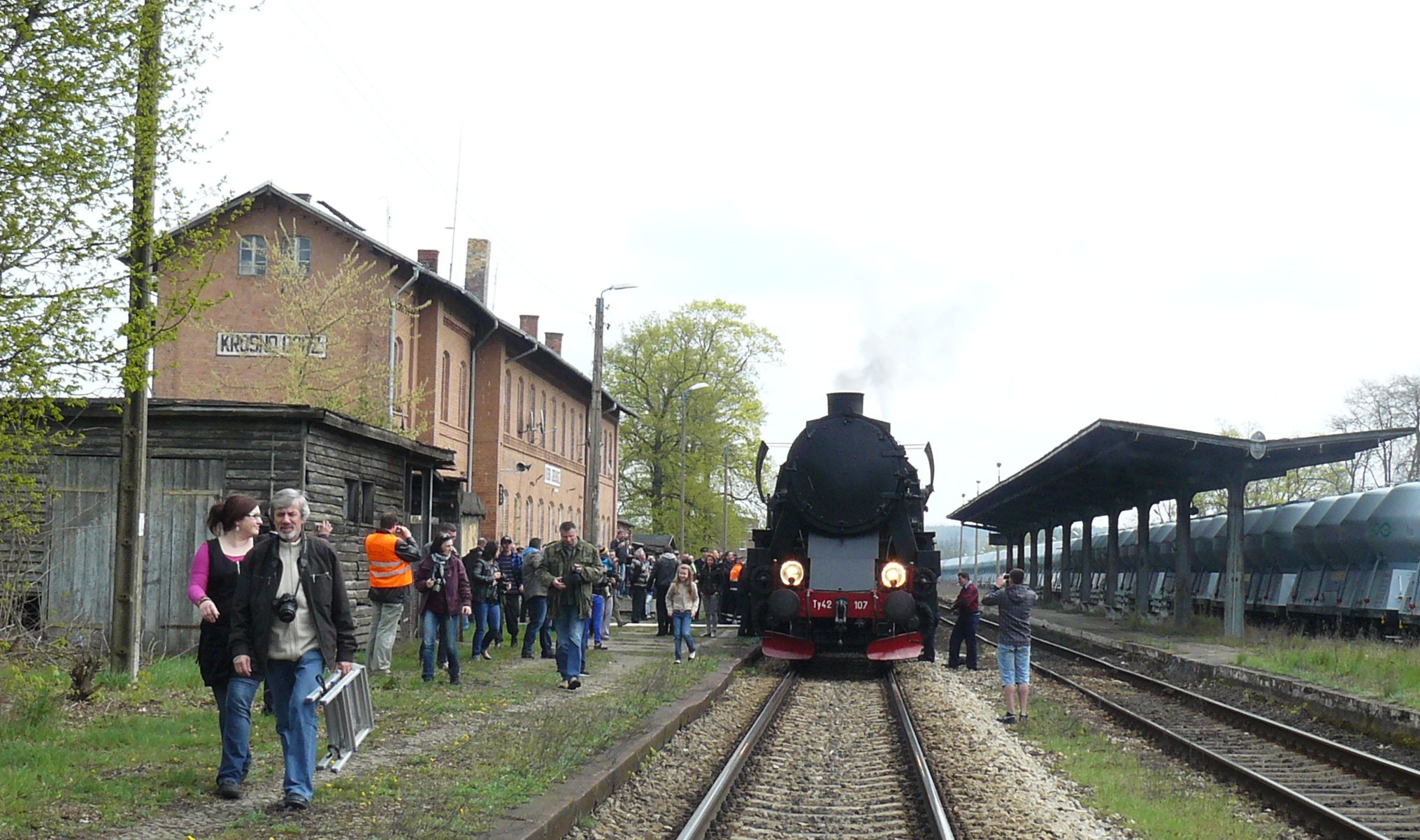 Ty42 107, 2013r., Parowozem przez Wielkopolskę. Krosno Odrzańskie.